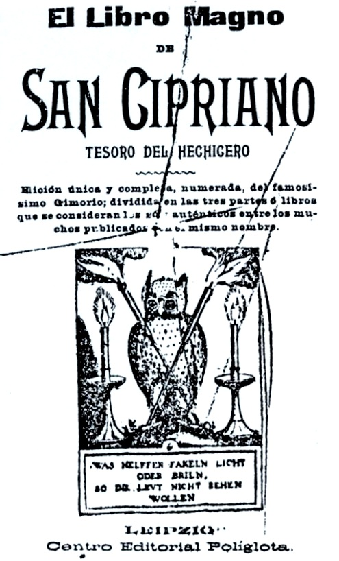 El Libro Magno de San Cipriano TESORO DEL HECHICERO ≈≈≈≈≈≈≈≈ LEIPZIG Centro Editorial Políglota